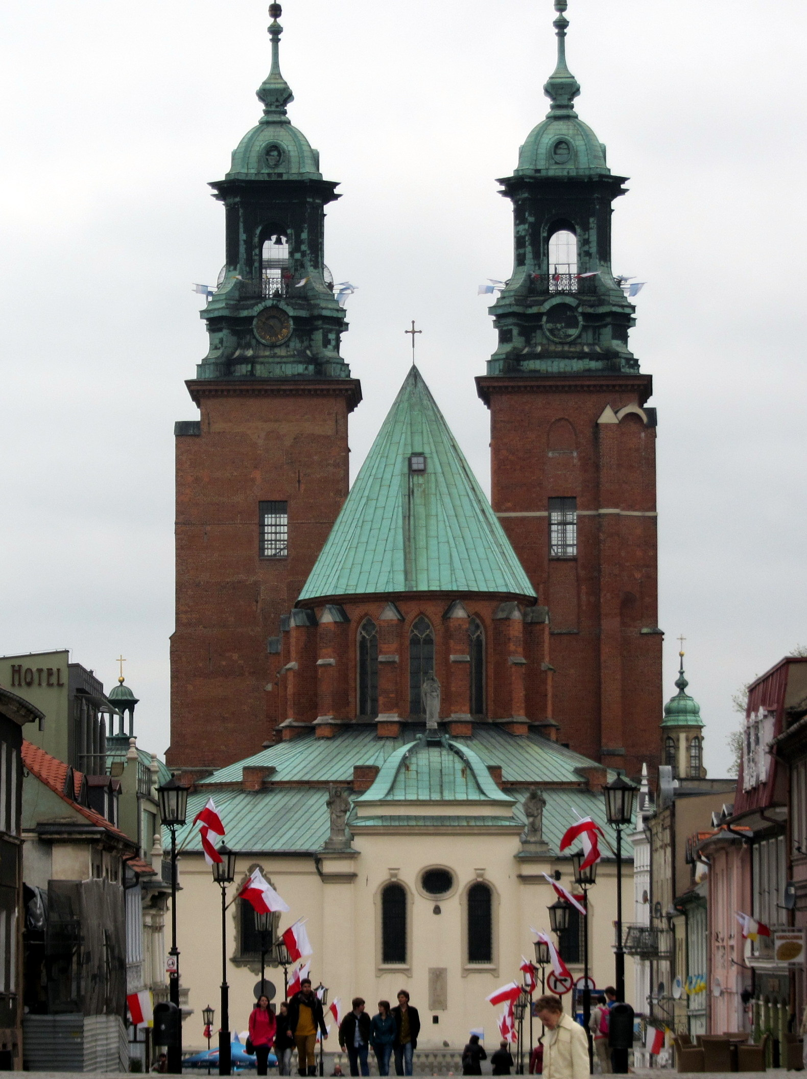 Katedra w Gnieźnie od strony rynku.